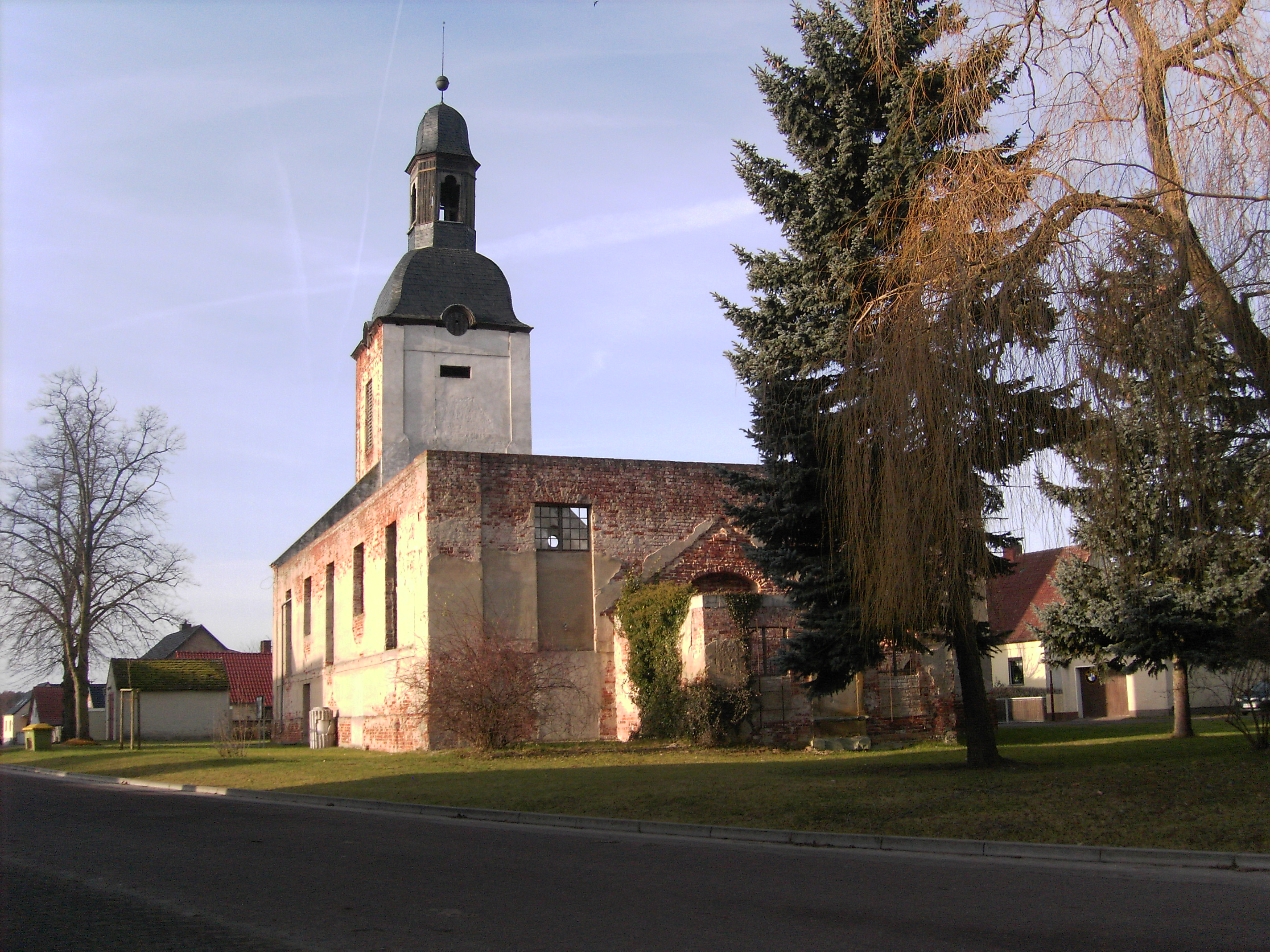 Dorfkirche Zabakuck, Ansicht von Osten